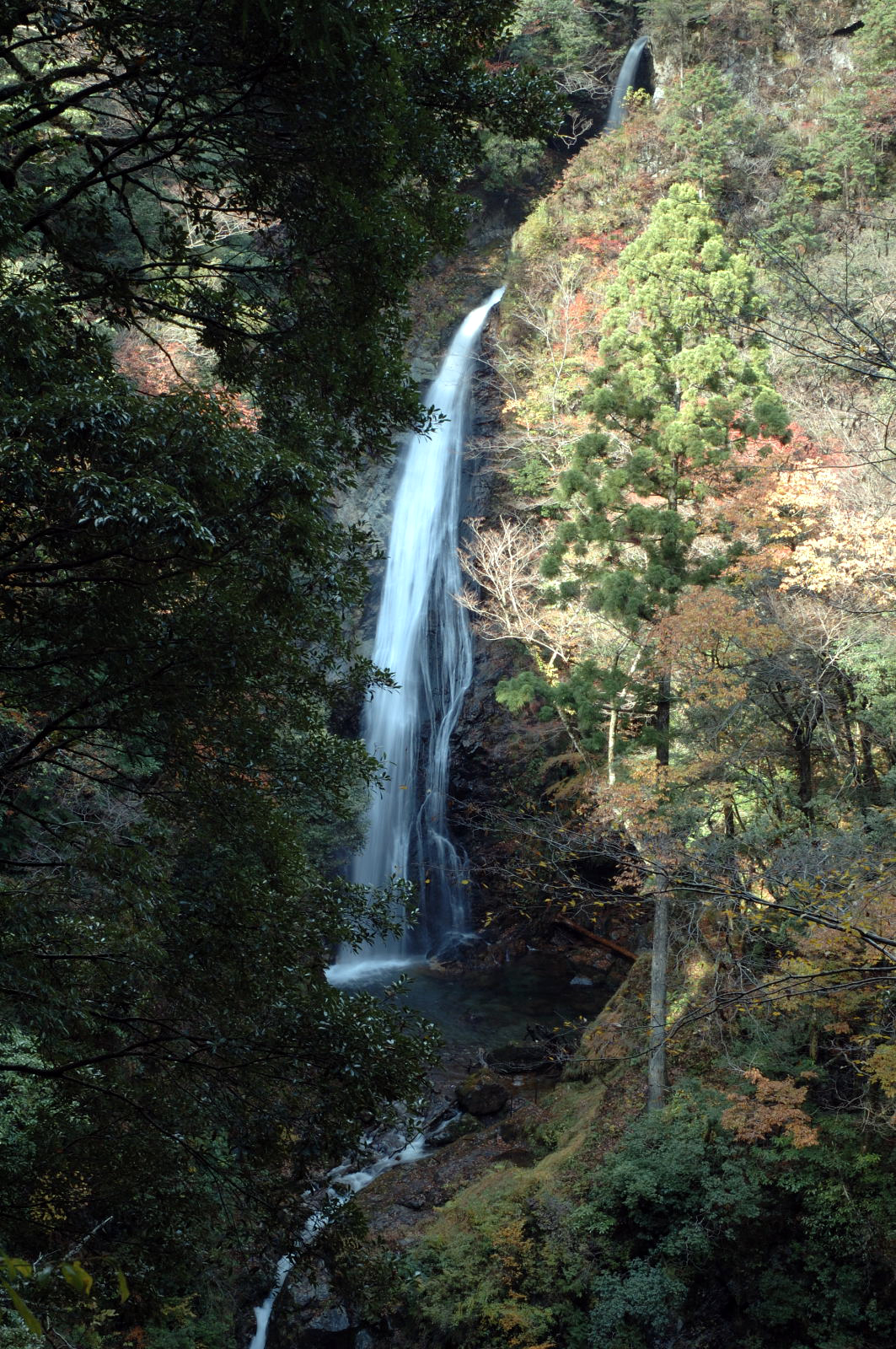 Harafudou waterfall in autumn